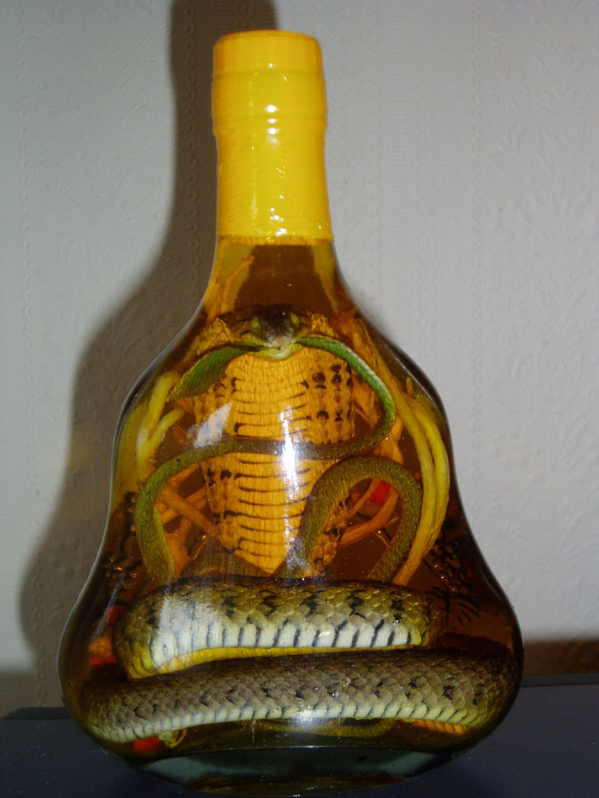 Vietnamese snake wine.